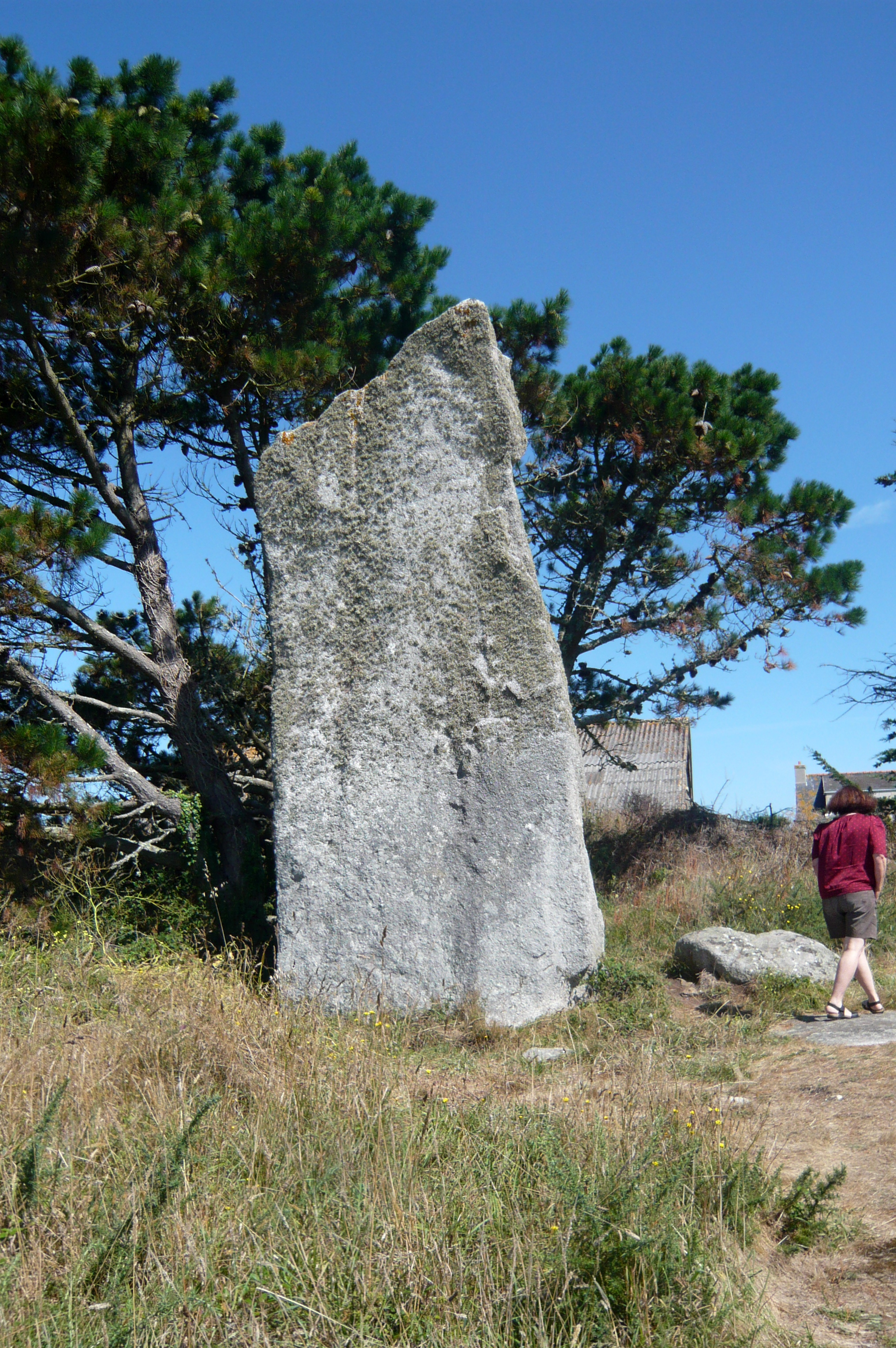 Menhir de Squividan ou de Reun, Léchiagat, Finistère (France).